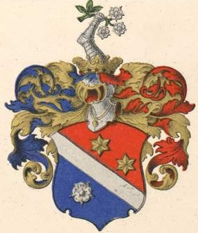 Spalchhaberi suguvõsa aadlivapp.